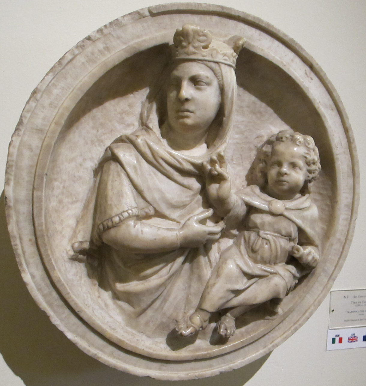 Tino di camaino, madonna col bambino, da sagrestia della collegiata